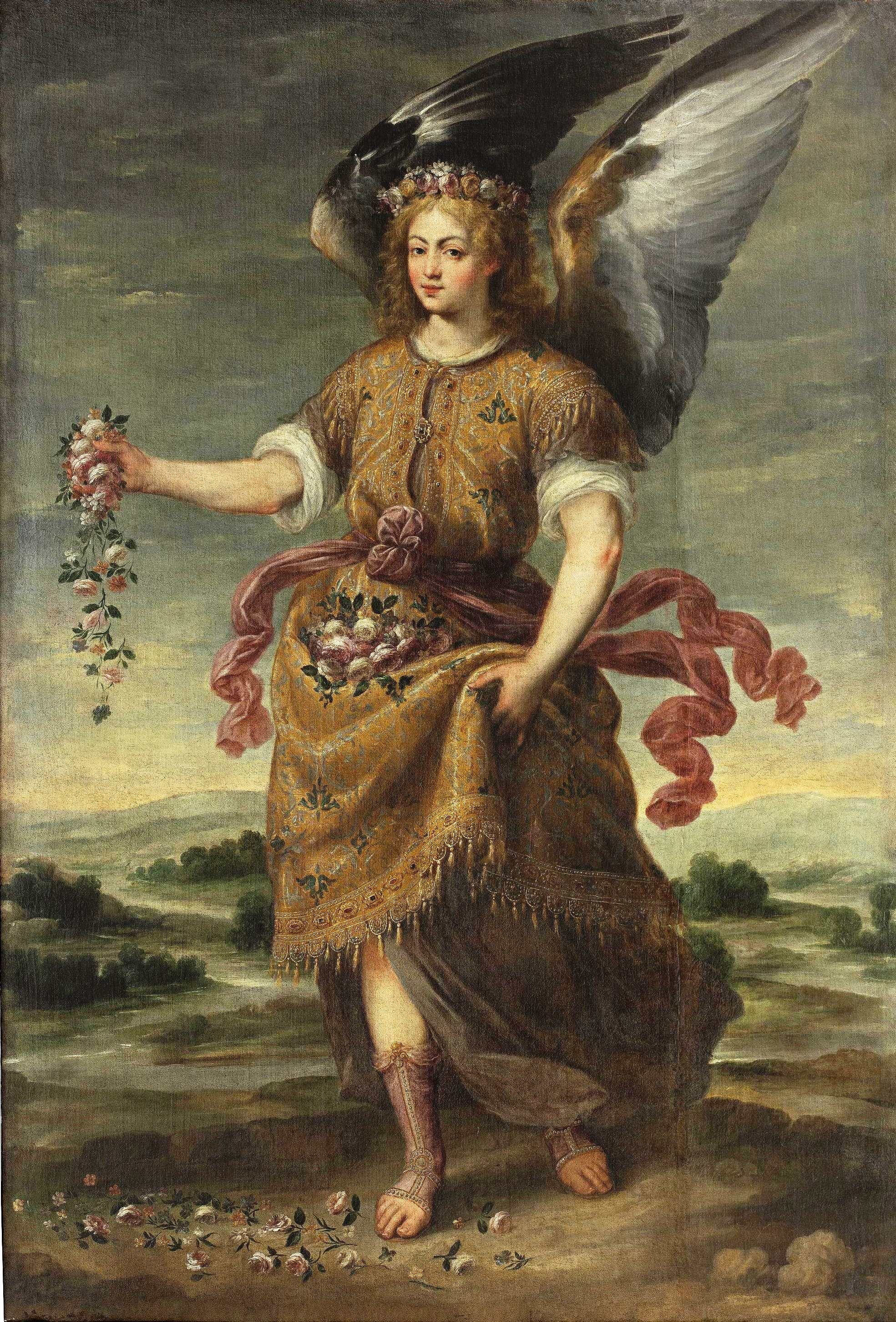 La obra representa al Arcángel Baraquiel esparciendo flores.